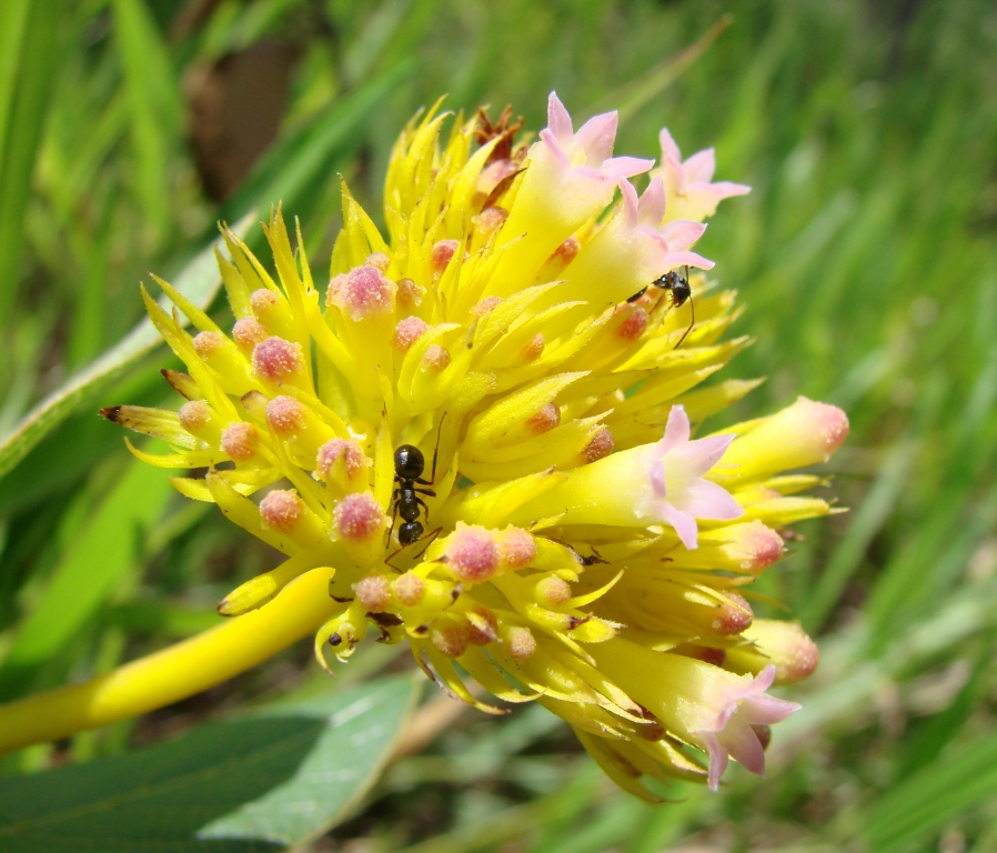 Palicourea coriacea - RUBIACEAE Parque Estadual Serra dos Pirineus - Pirenópolis - Goiás - Brasil